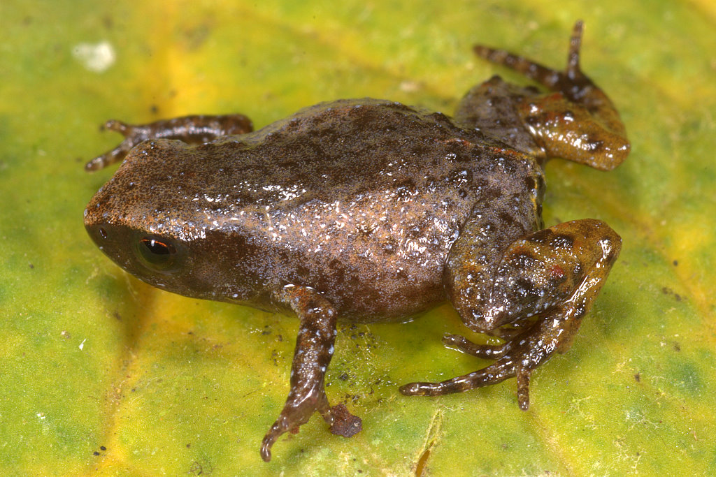 Noblella pygmaea